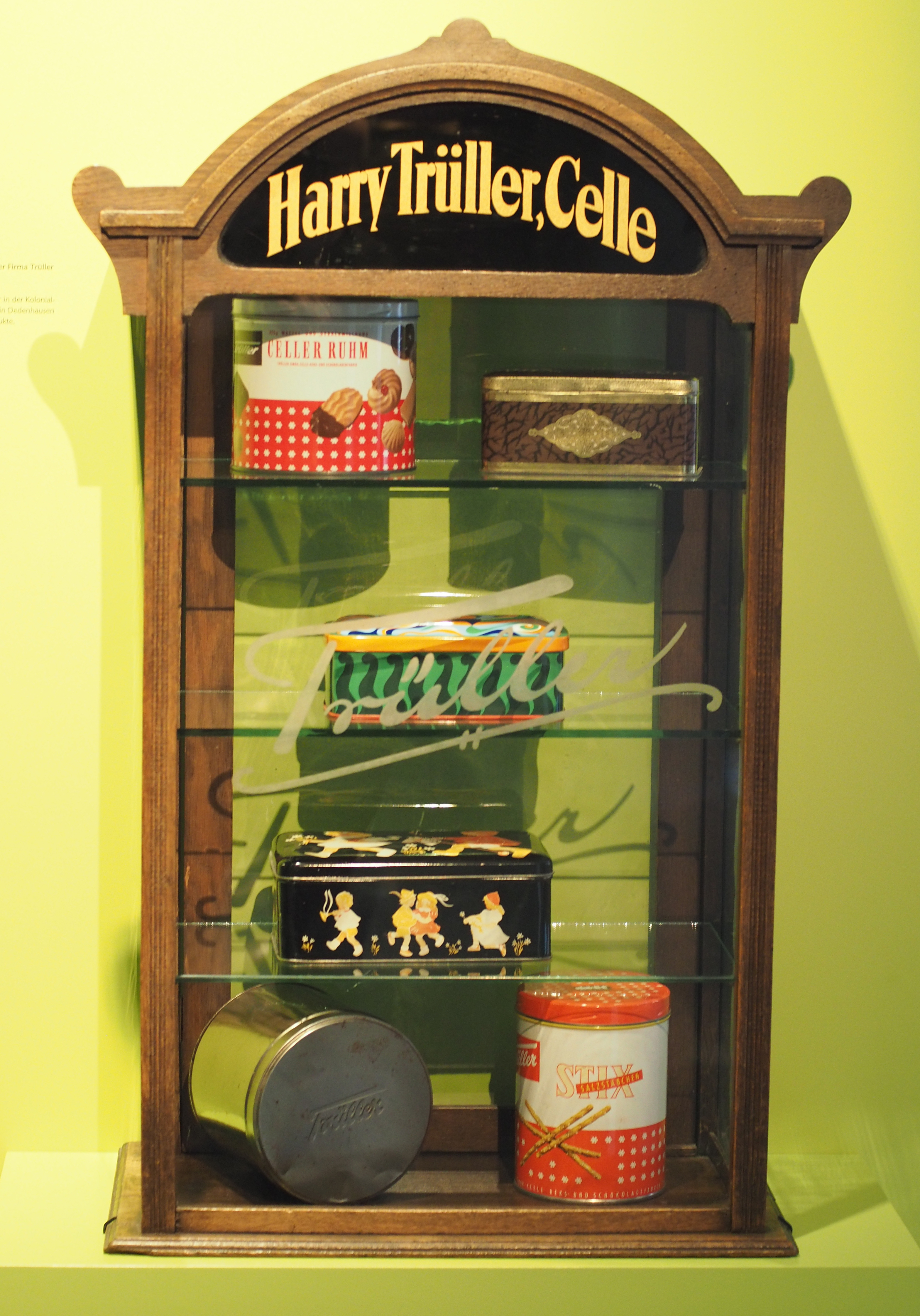 Im Bomann-Museum Celle, Verkaufsvitrine der Firma Harry Trüller, Celle (20. Jahrhundert)